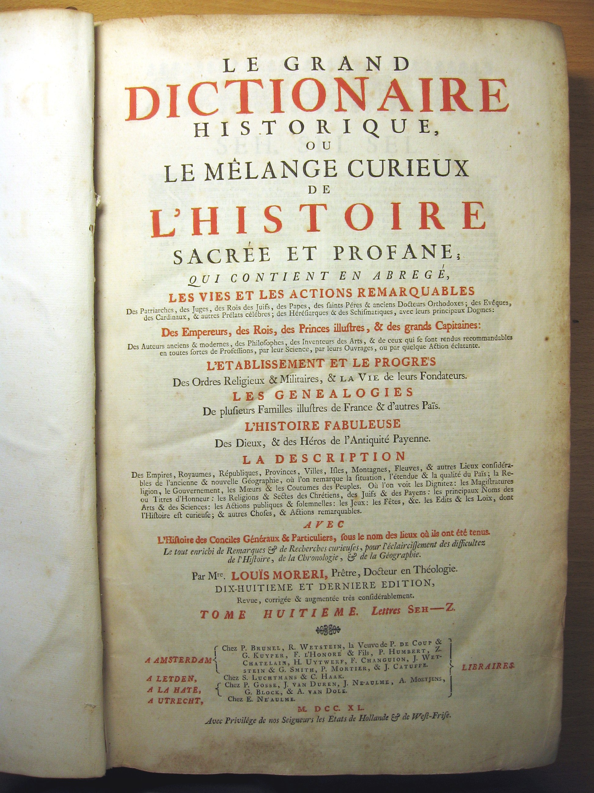 Louïs Moreri, Le Grand Dictionaire Historique …, 18. et derniere ed., rev., corr. & augm. tres considerablement, Amsterdam [u.a.] 1740. T. 7: Lettres P.